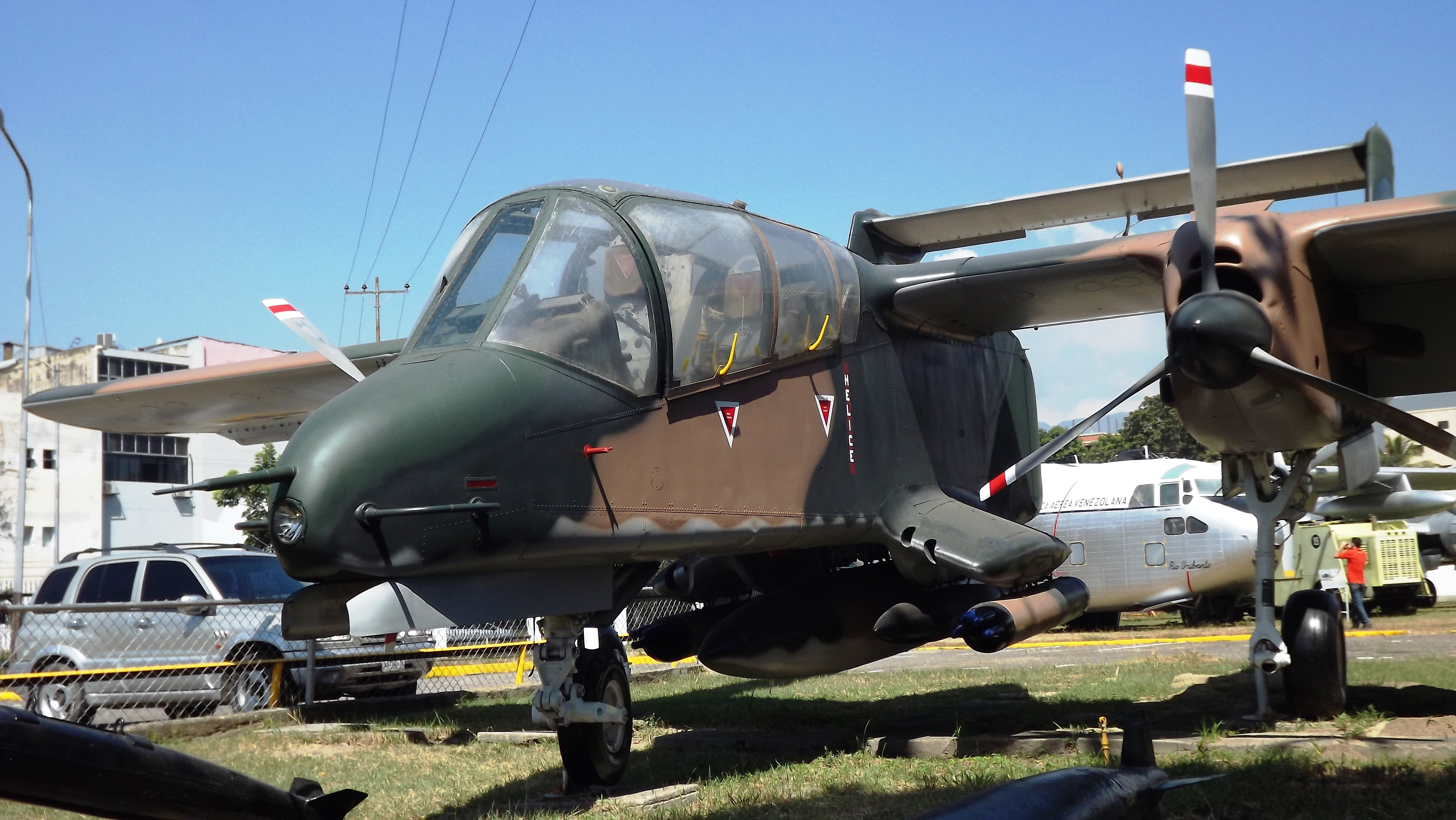 2641 Rockwell OV-10E Bronco - Museo Aeronautico